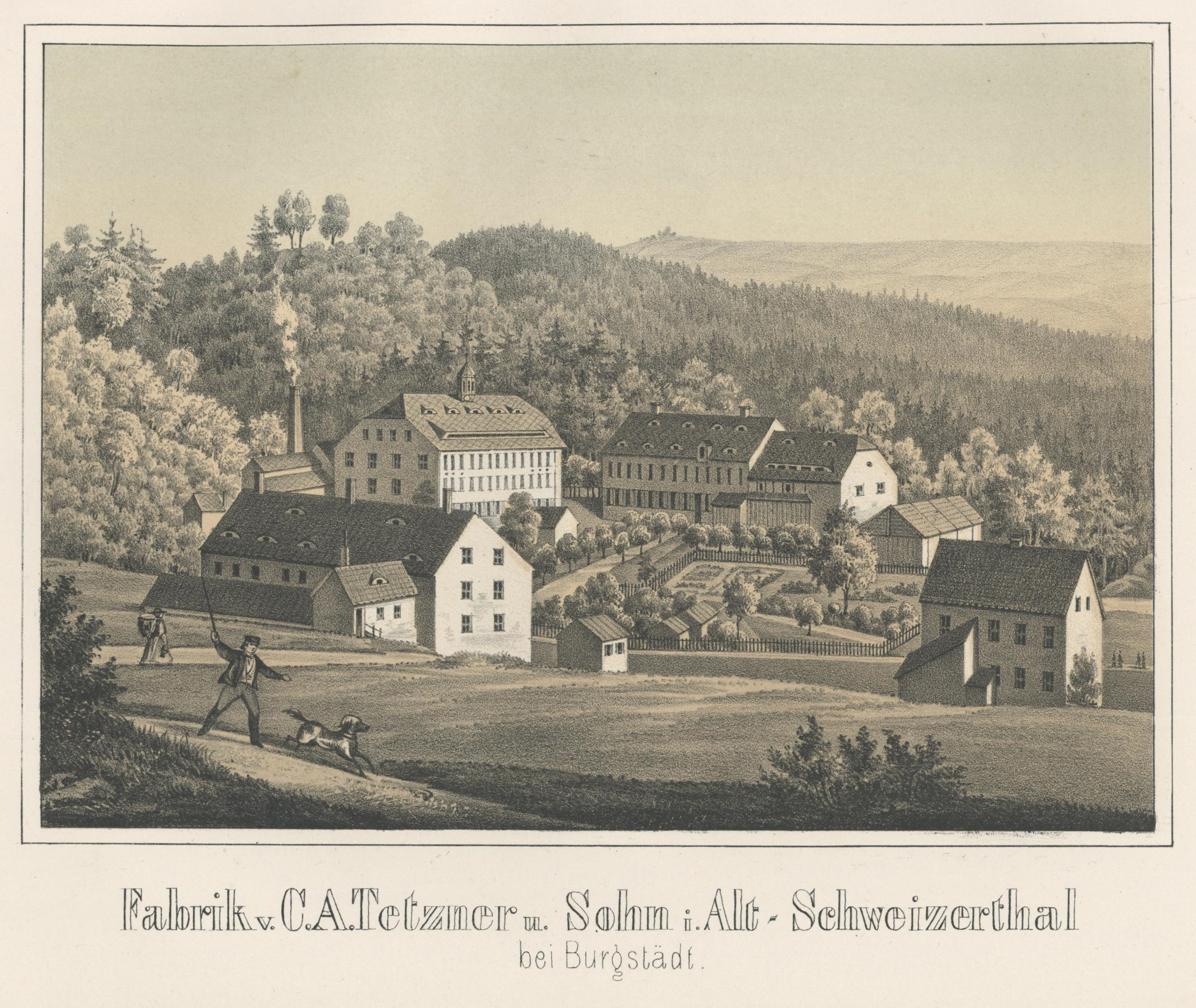 Fabrik von C. A. Tetzner und Sohn in Alt-Schweizerthal bei Burgstädt aus: Album der Sächsischen Industrie Zweiter Band